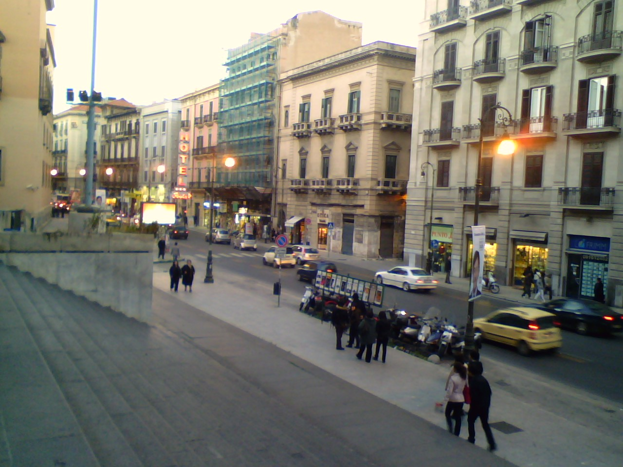 sono l'autore rilascio tutti i diritti